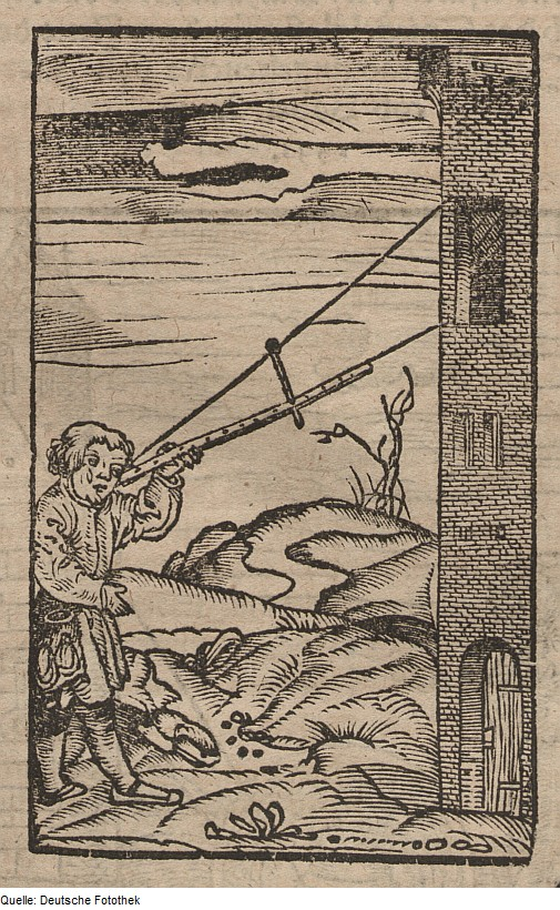 Original image description from the Deutsche Fotothek Geometrie & Vermessung & Vermessungsinstrument & Jakobstab & Gradstab & Streckenmessung & Winkelmessung